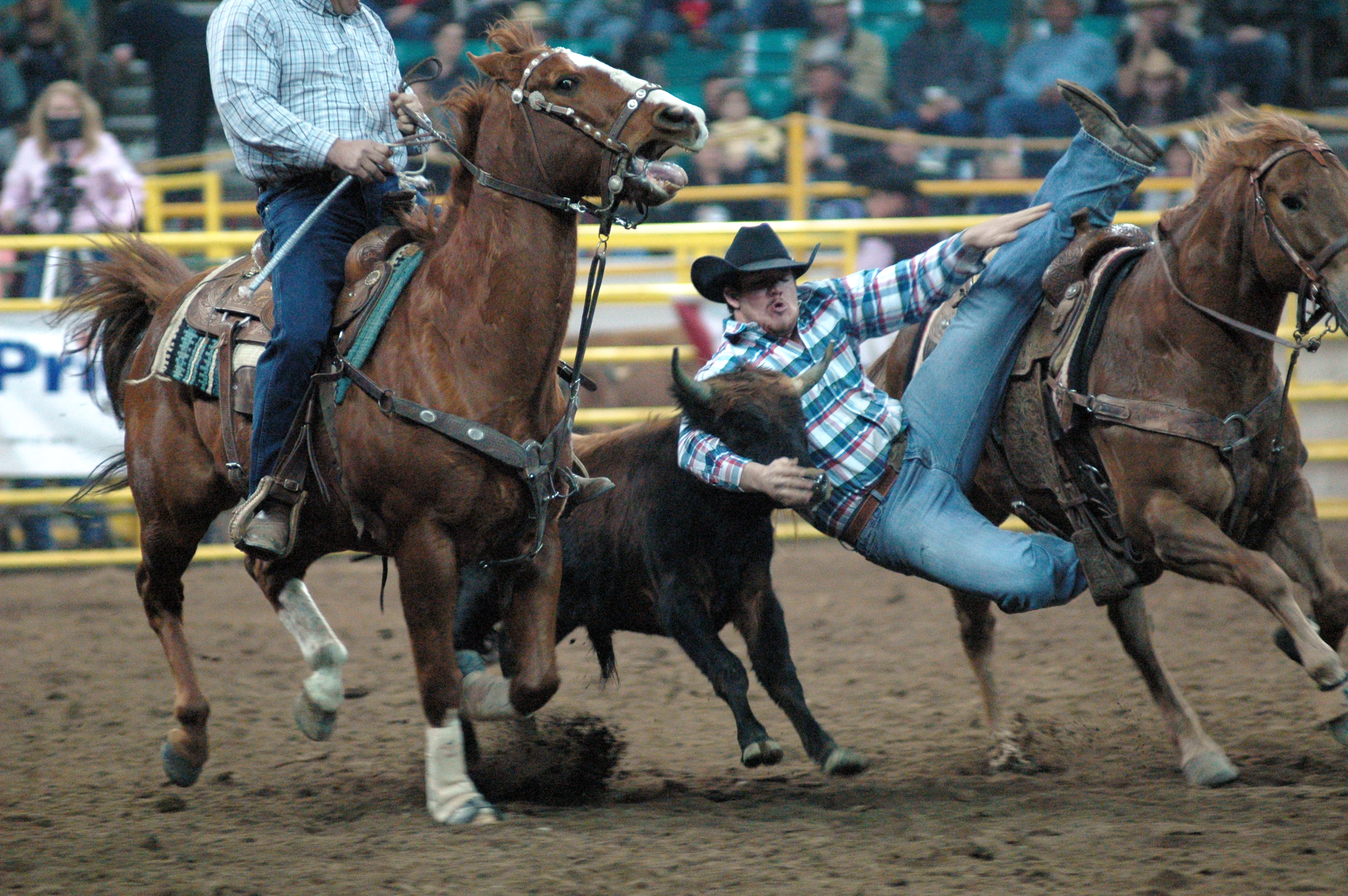 Rodeo